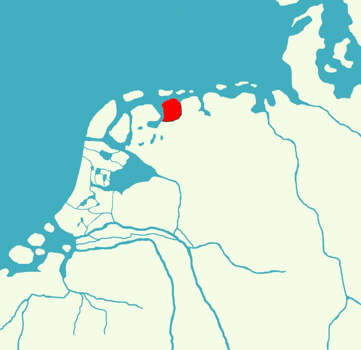 Eigen werk. Ligging van de Oostergo in het Frankische Rijk. Gemaakt door Sindala op 28 maart 2007.